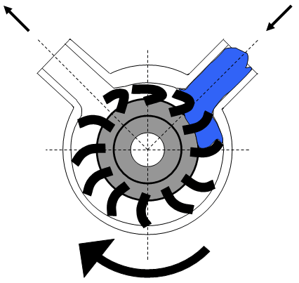 Импеллерный насос